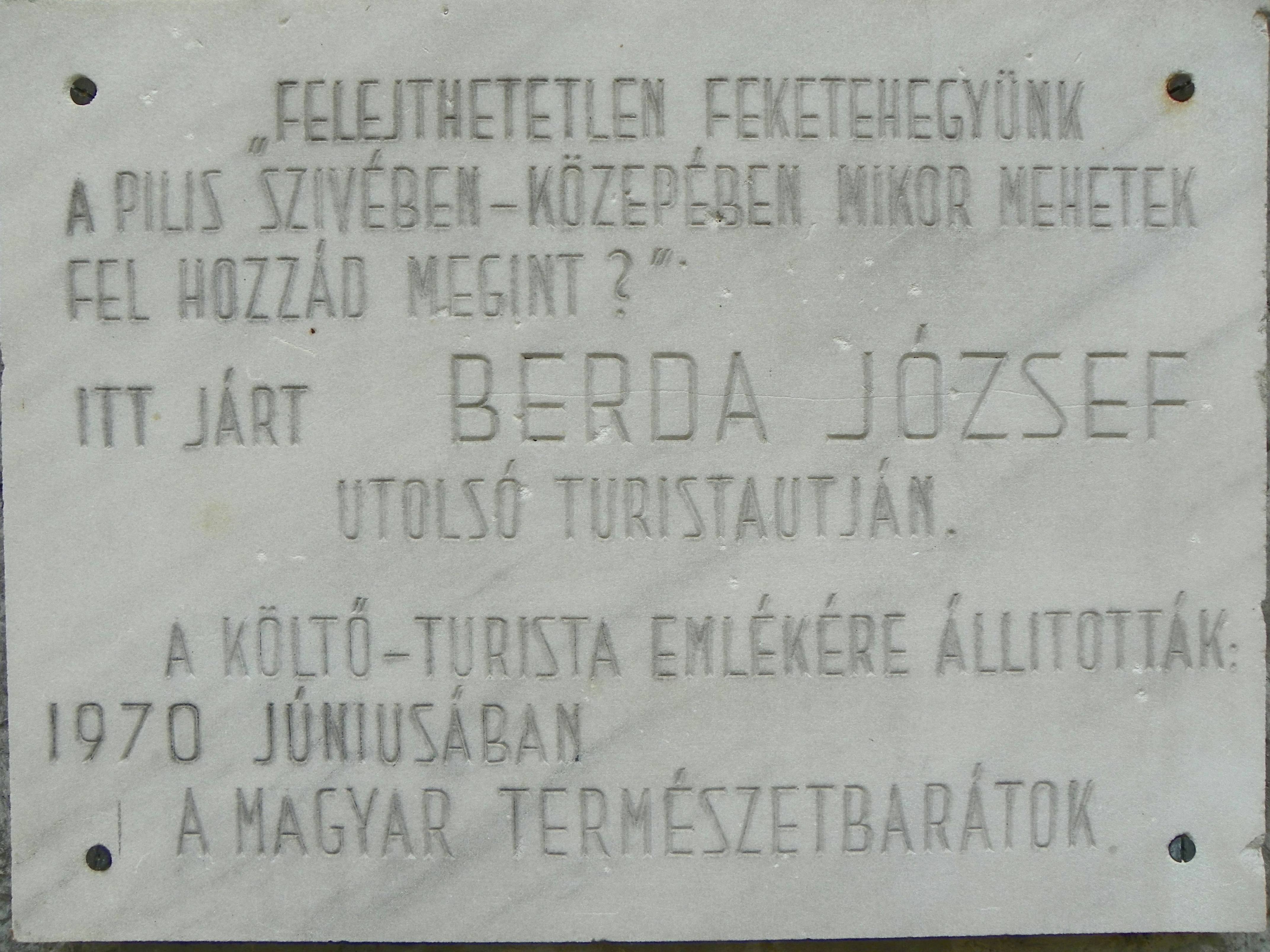 Emléktábla a Sasfészek turistaházon